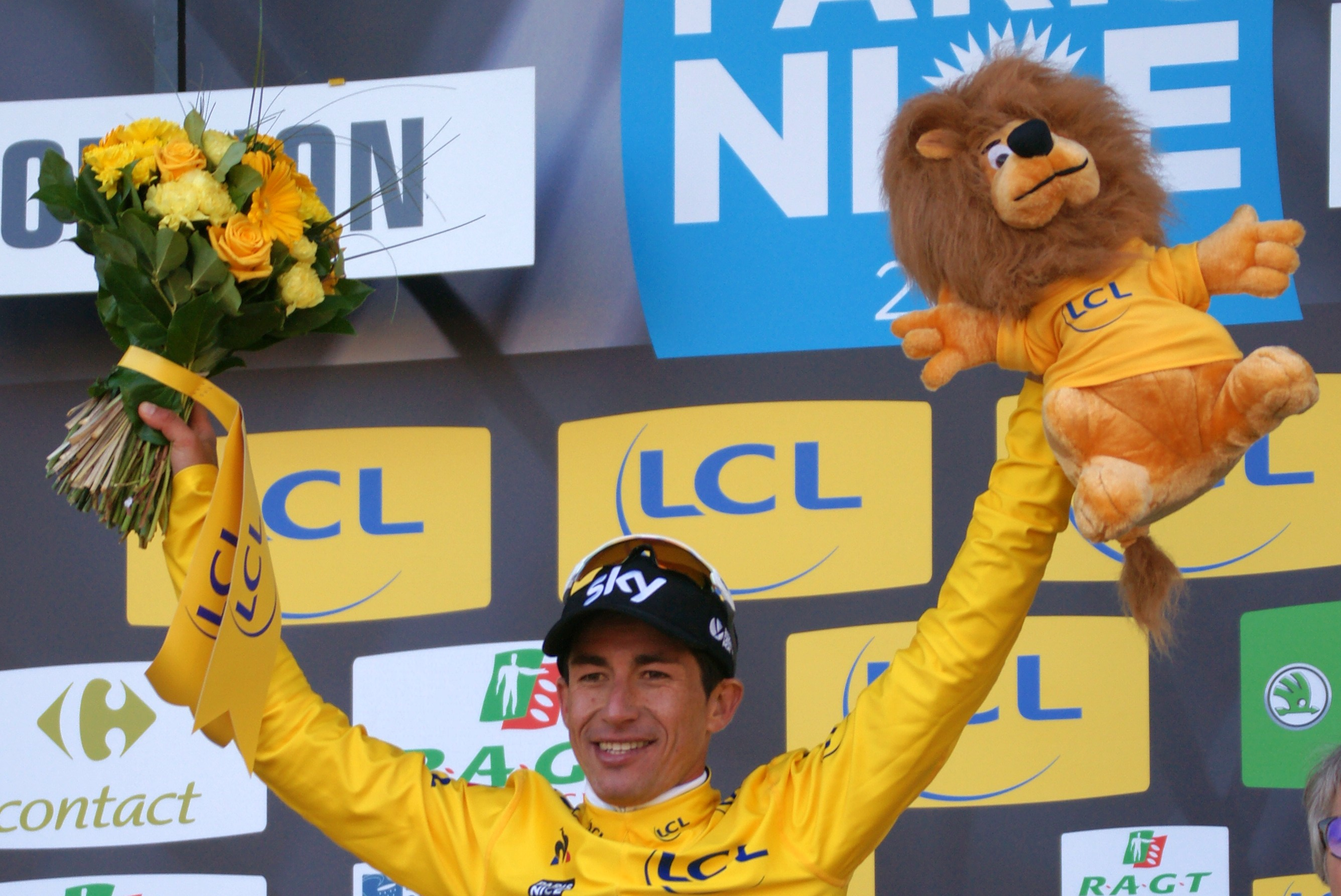 Sergio Henao, Paris-Nice 2017